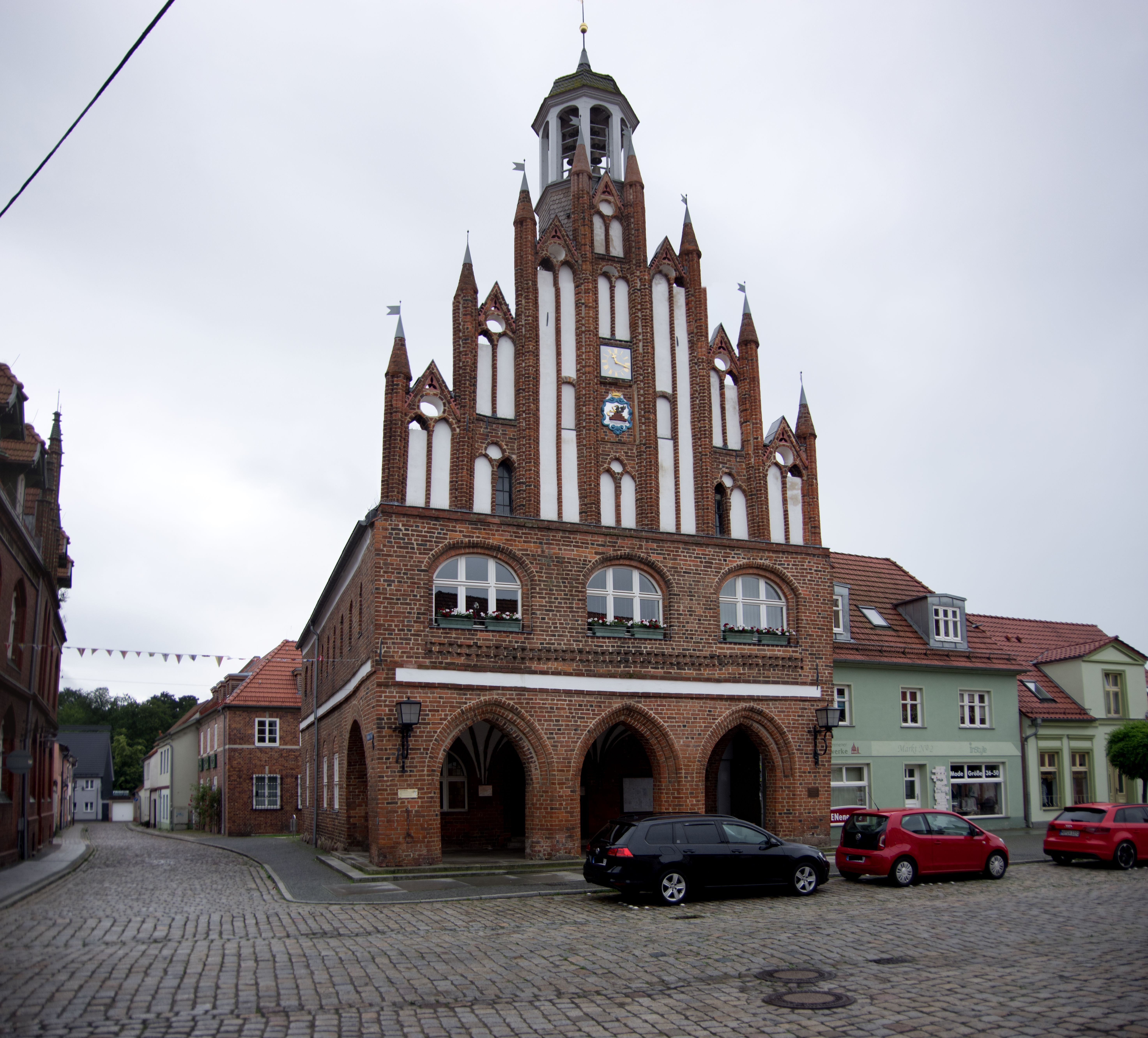 Grimmen in Mecklenburg-Vorpommern. Das Rathaus steht unter Denkmalschutz.